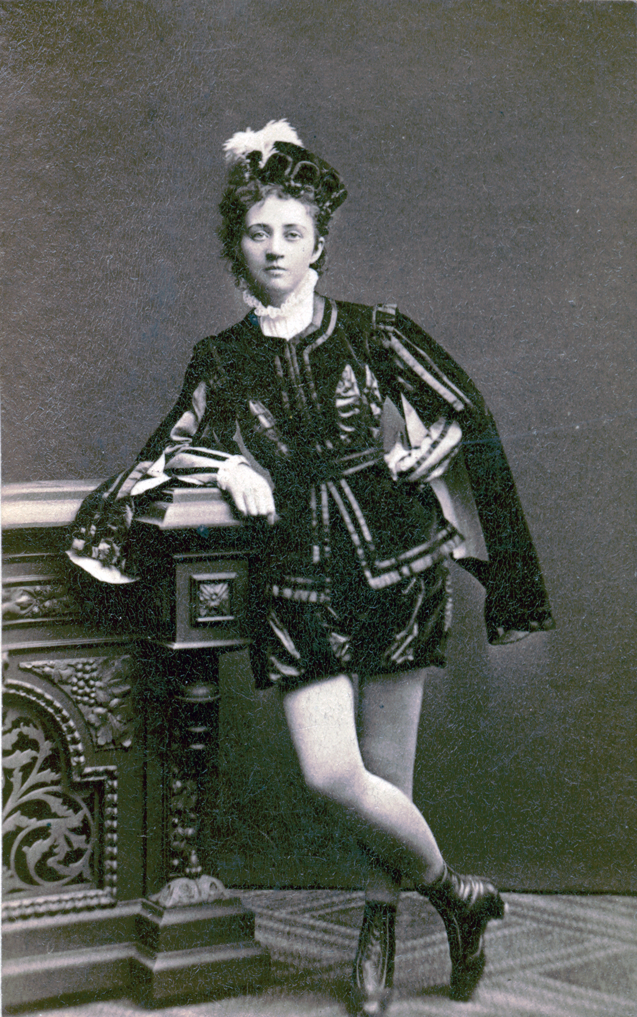 Lydia Wessler, elev vid Kungliga Operan 1872